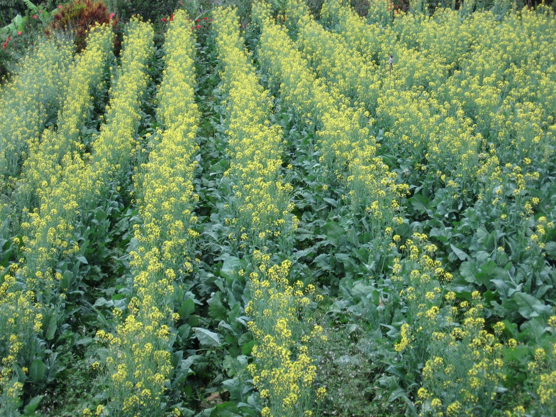 Cultivo de Mostaza en el corregimiento de San Antonio de Prado, Medellín, Colombia.